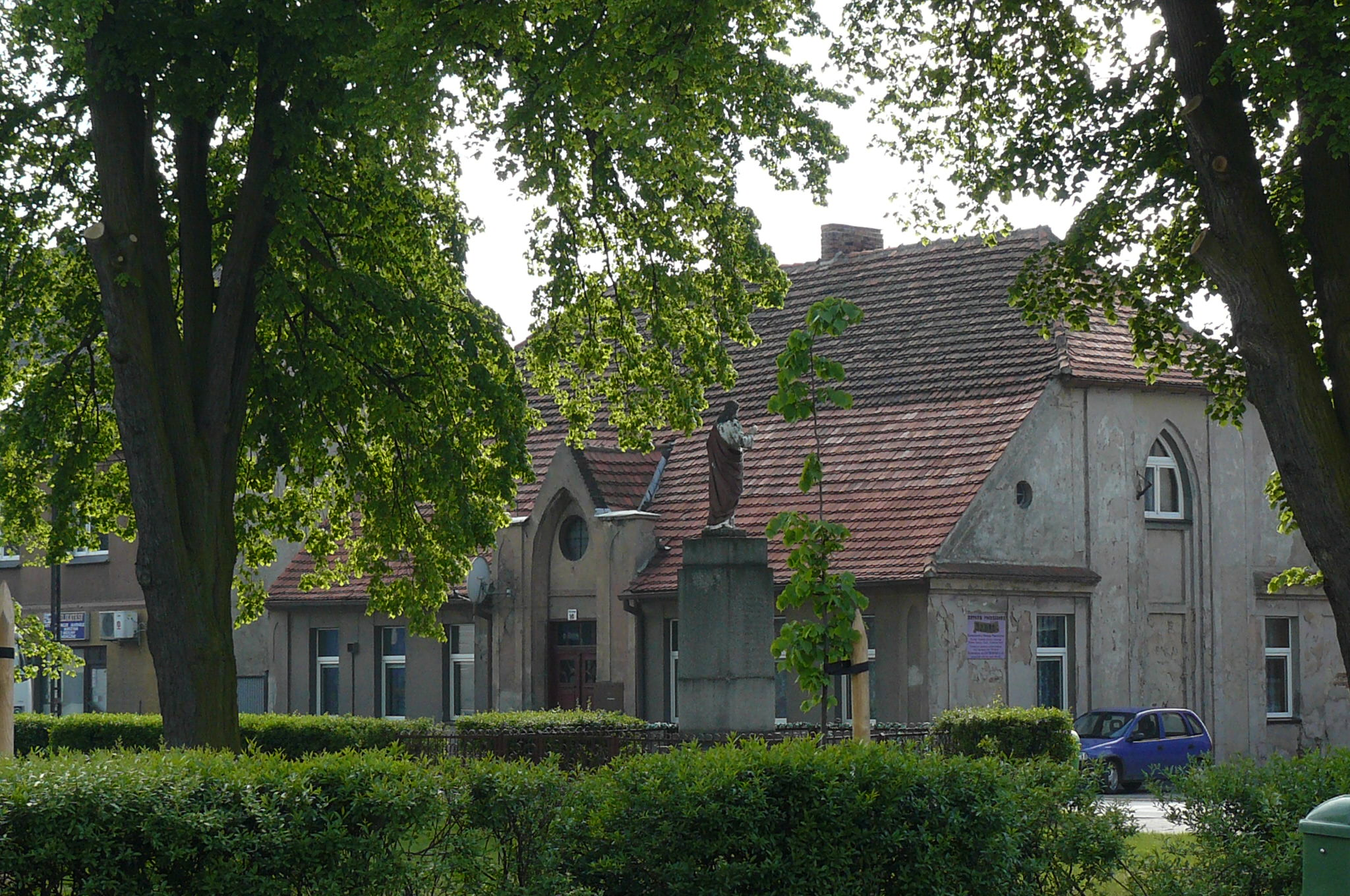 Rynek w Cieszkowie.